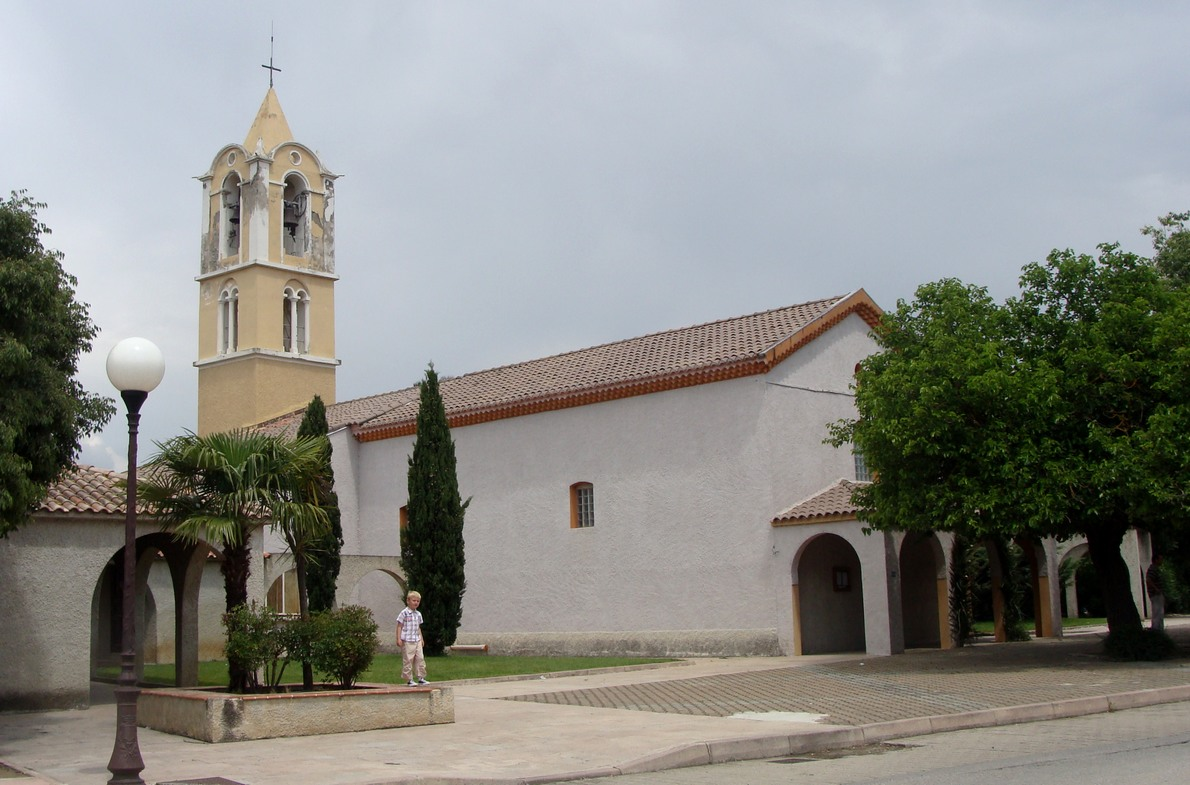 L'église Saint-Michel de Ghisonaccia (Haute-Corse), vue d'ensemble de l'extérieur.